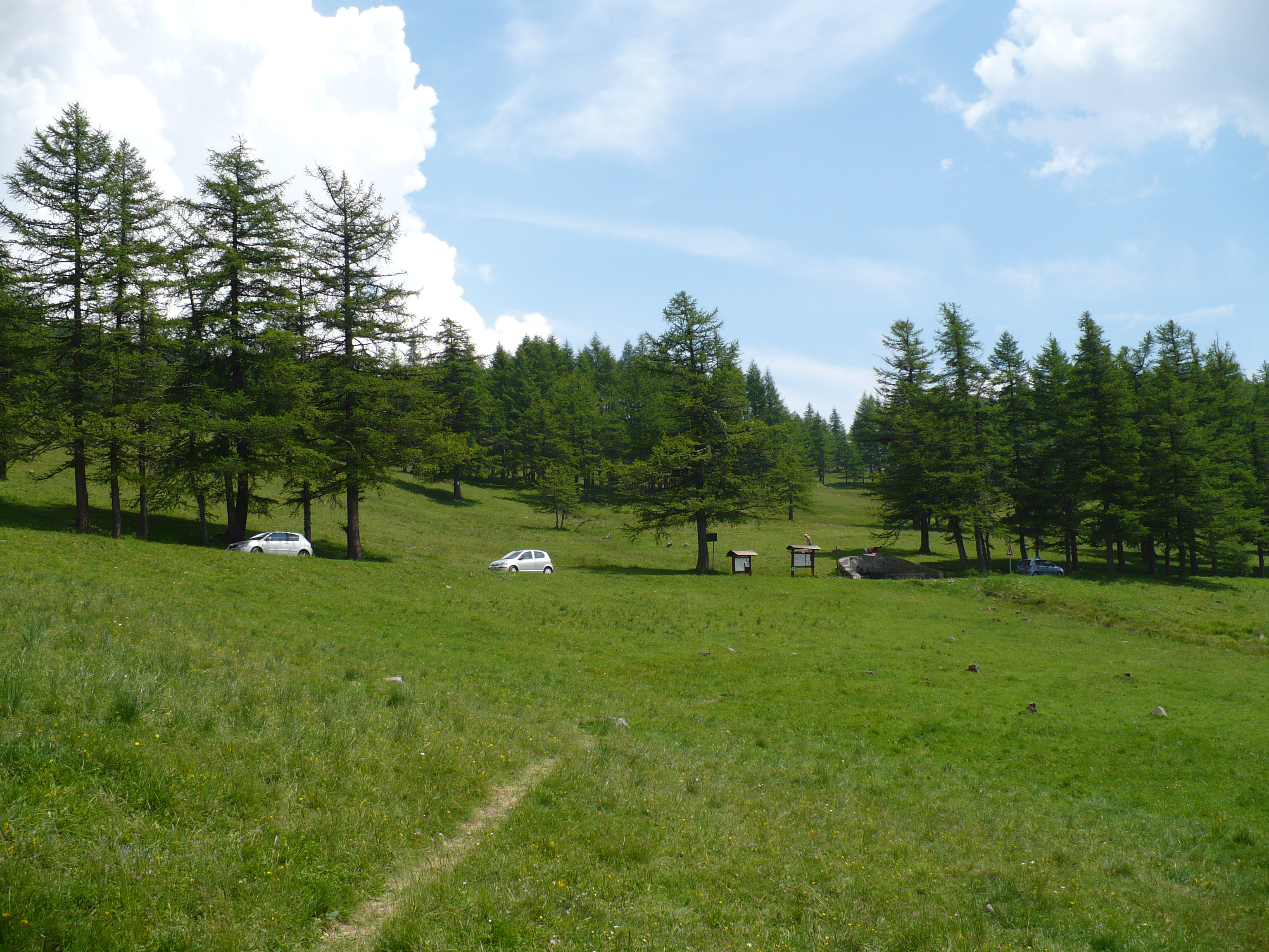 Pracatinat, località in val Chisone - Provincia di Torino - Italia